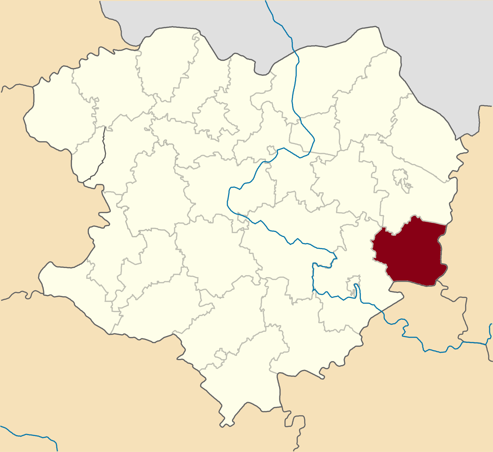 Borivskyi-Raion map